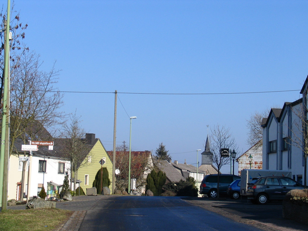 Die Dorfstraße (Hauptstraße) in Steineberg (Eifel) Blick entlang der Dorfstraße in Steineberg von Süden (Ellscheid) nach Norden (Steiningen). Rechts: Jugendzentrum Steineberg; geradeaus: Kirche von Steineberg